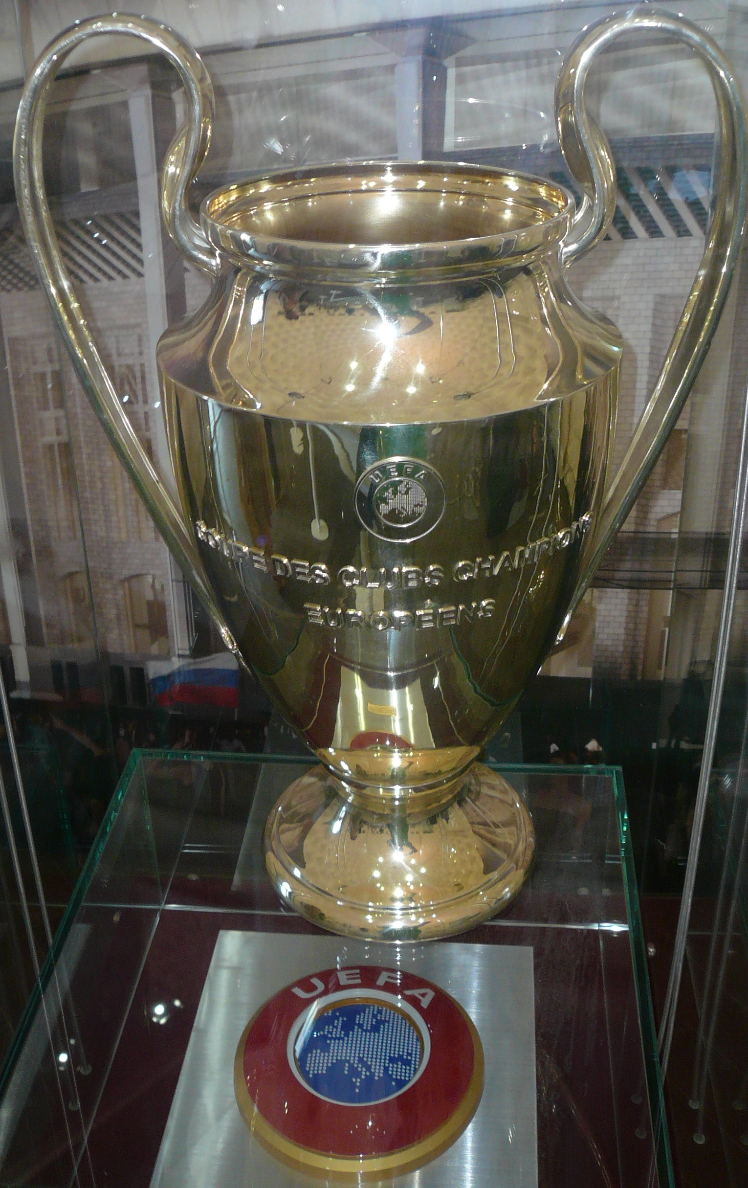 Кубок Лиги чемпионов УЕФА в музее стадиона "Лужники", Москва, Россия. Серебряная амфора с золотым покрытием внутри. На задней стенке Кубка выгравированы названия клубов-обладателей трофея в разные годы.Из-за оригинального дизайна Кубка его неформально называют "Большие уши". Финальный матч Лиги чемпионов УЕФА прошёл в 2008 году между командами "Челси" и "Манчестер Юнайтед" на стадионе "Лужники". В знак благодарности УЕФА подарила Москве и стадиону "Лужники" трофей турнира (к каждому финалу изготавливается несколько идентичных кубков на случай непредвиденных обстоятельств, например, утери или повреждения. Один из таких кубков вручается победителю).